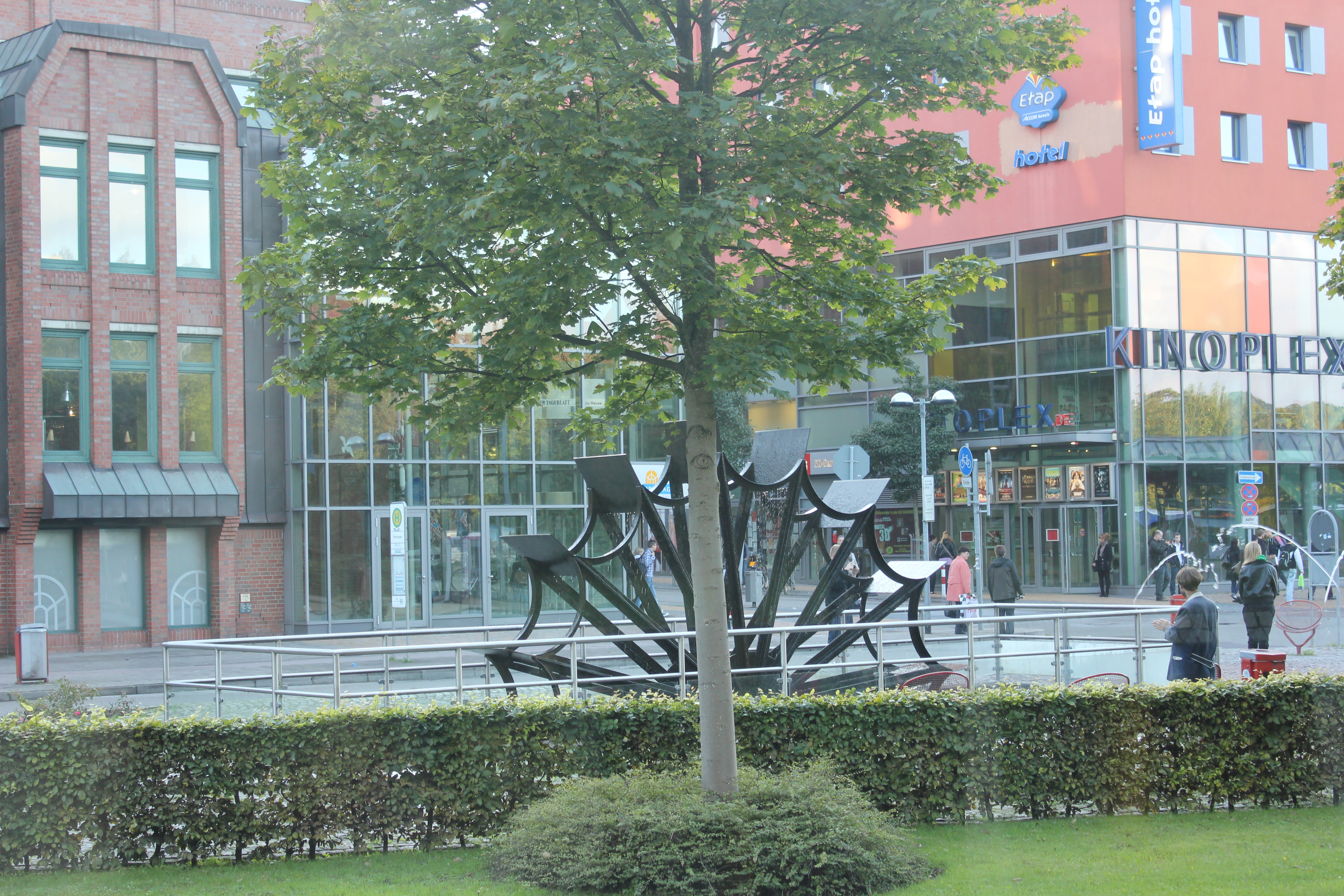 Mühlenstrom-Wasserrad beim ZOB, Flensburg, Bild 1; mit Holmpassage im Hintergrund zur Linken; zur Rechten das Flensburger Kino am ZOB; zu der Zeit Betreiber Kinoplex